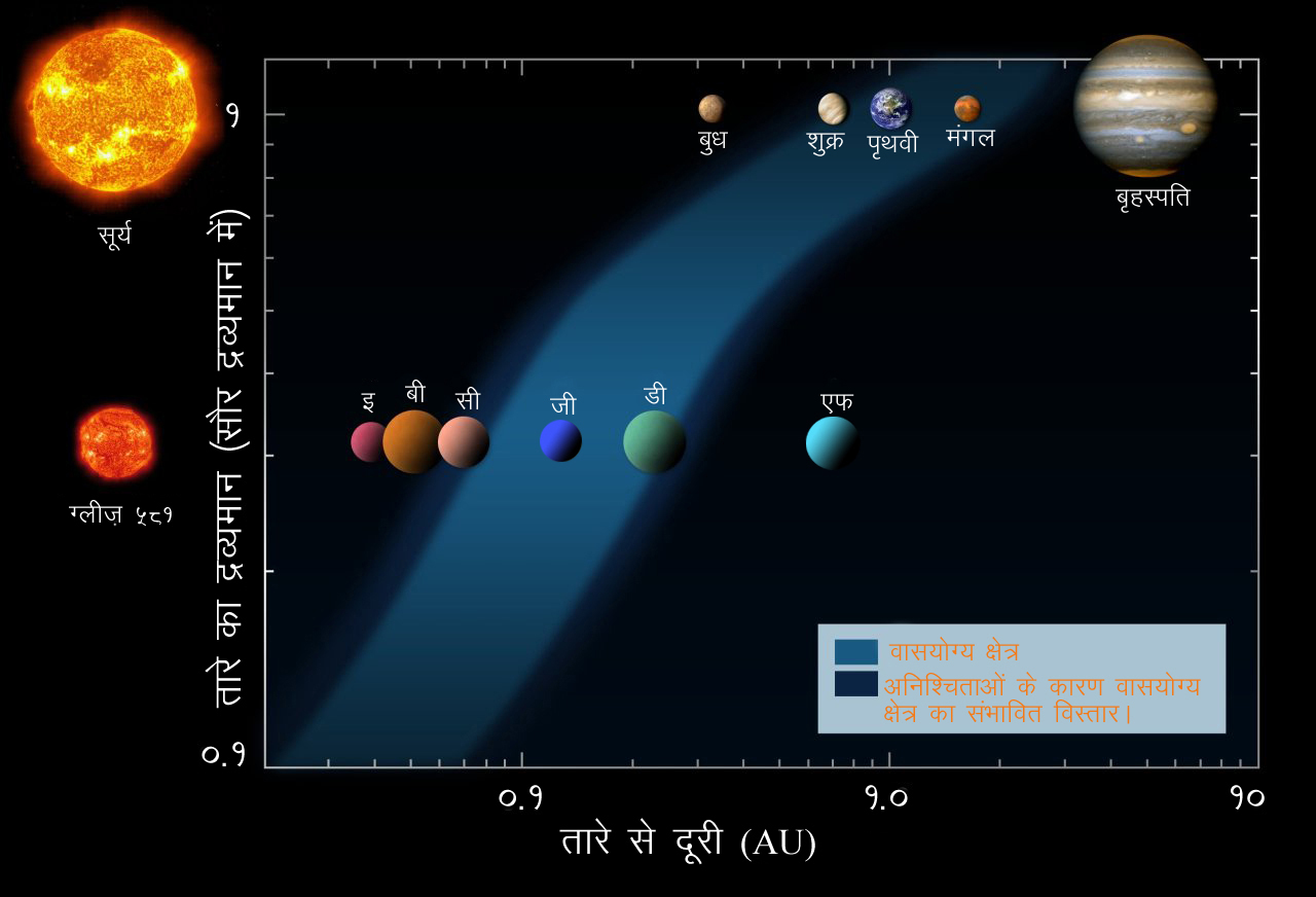 सूर्य और ग्लीज़ ५८१ तारा मंडलो के वासनीय क्षेत्रो की तुलना।